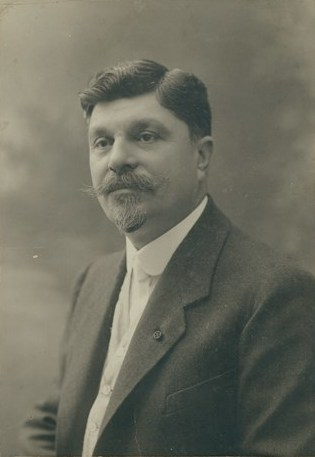 Снимка на д-р Петър Цончев от Габрово – лекар, писател и известен историограф на Габровския регион, изтъкнат общественик и щедър дарител.